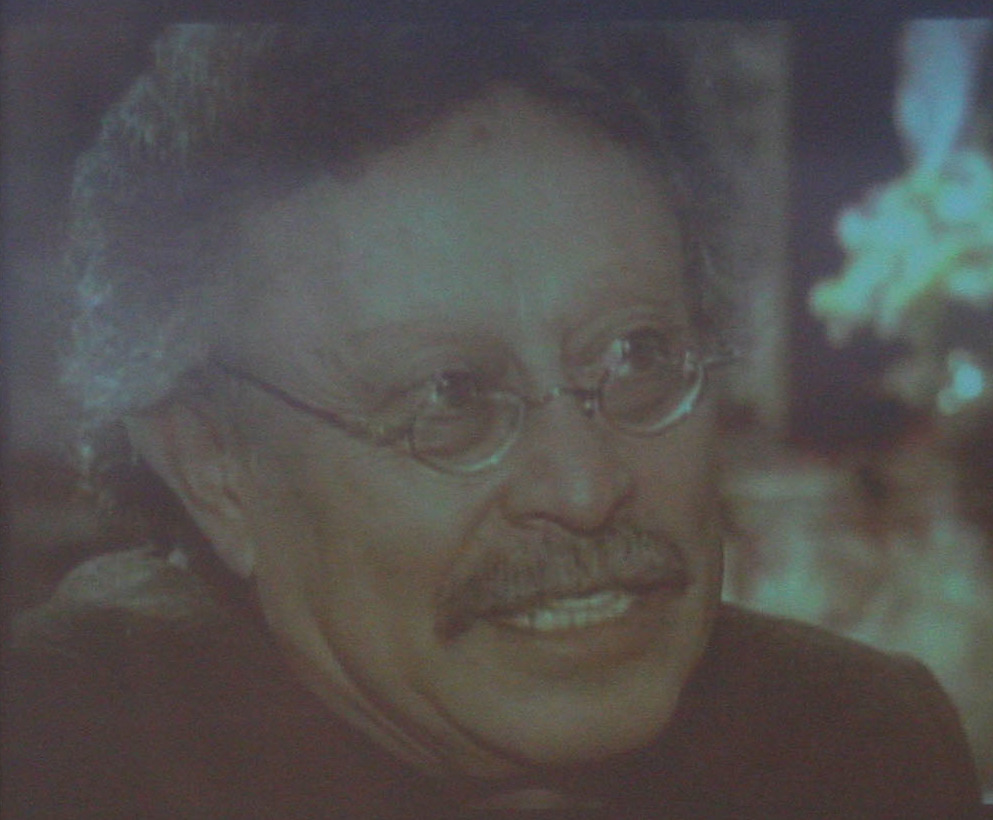 Foto: Romina Icaza/ Asamblea Nacional.